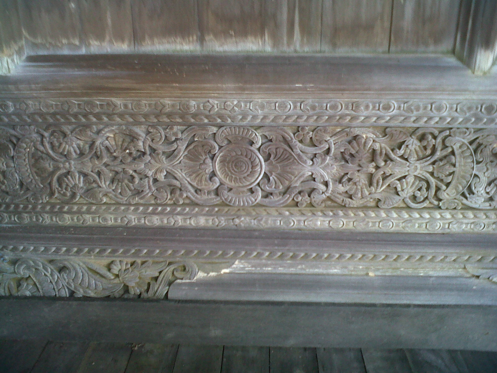 Motif Ukiran Kambang Talipuk pada Rumah Bubungan Tinggi Desa Habirau